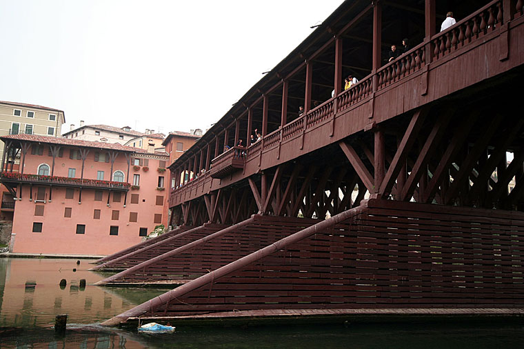 Ponte Degli Alpini, coté amont de la Brenta